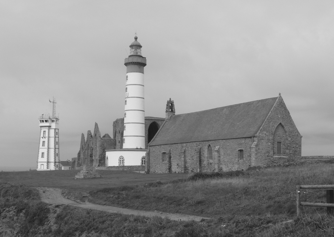 Abbaye de Saint-Mathieu de Fine-Terre